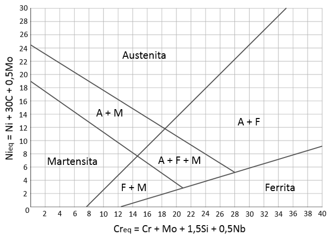 Diagrama para classificação de consumíveis de soldagem